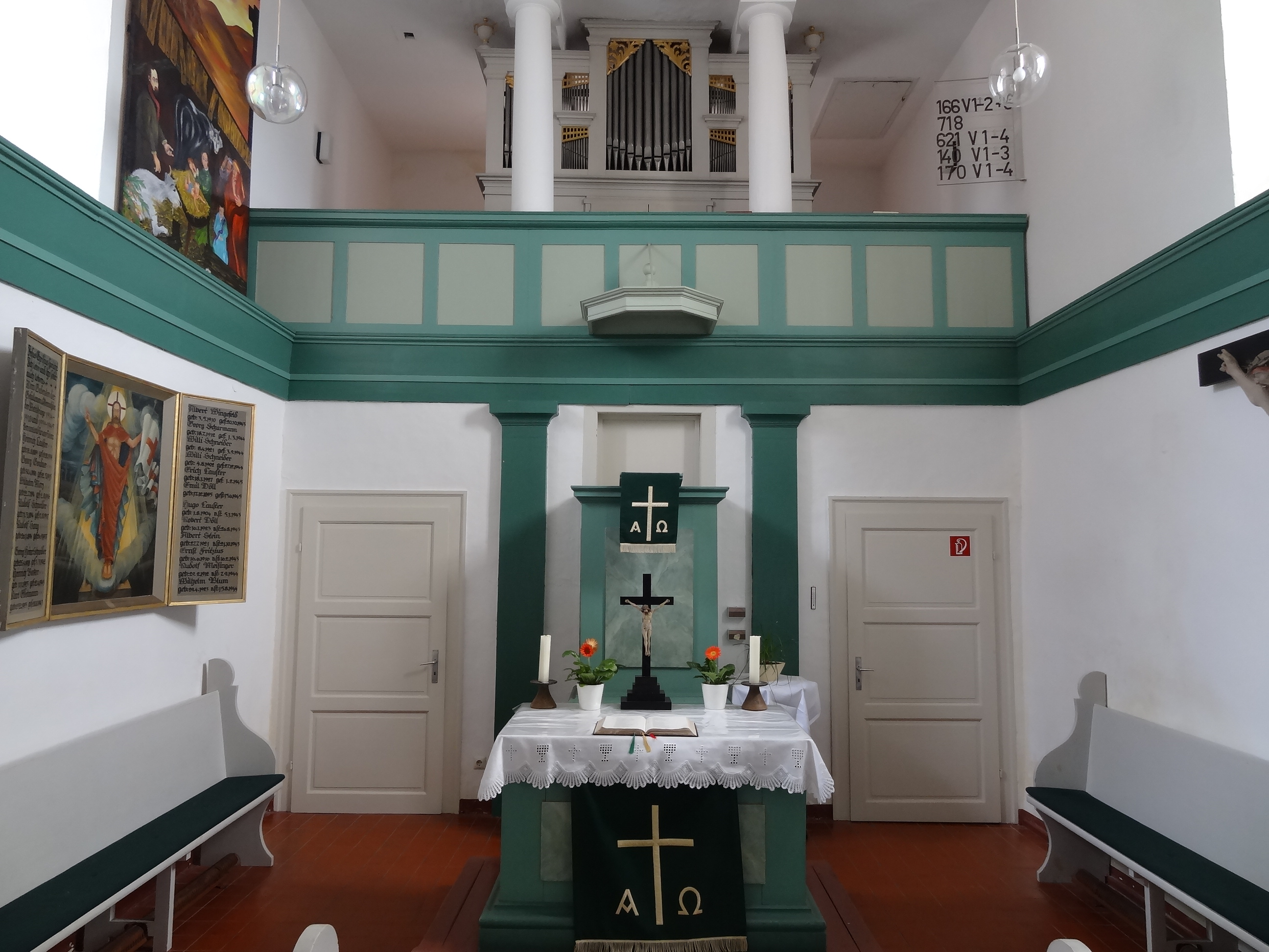 Evangelische Kirche Stornfels